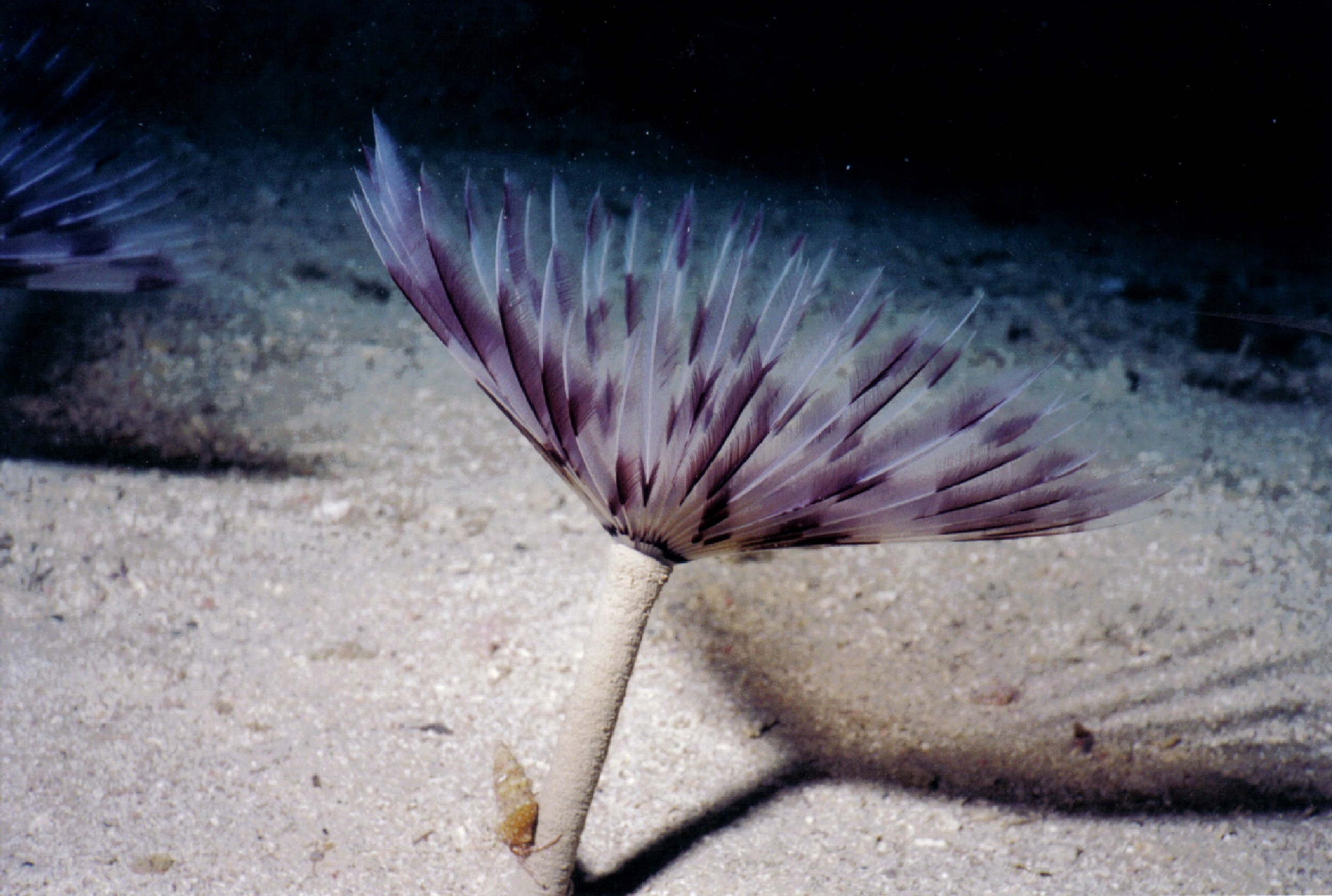 Pfauenfederwurm 2